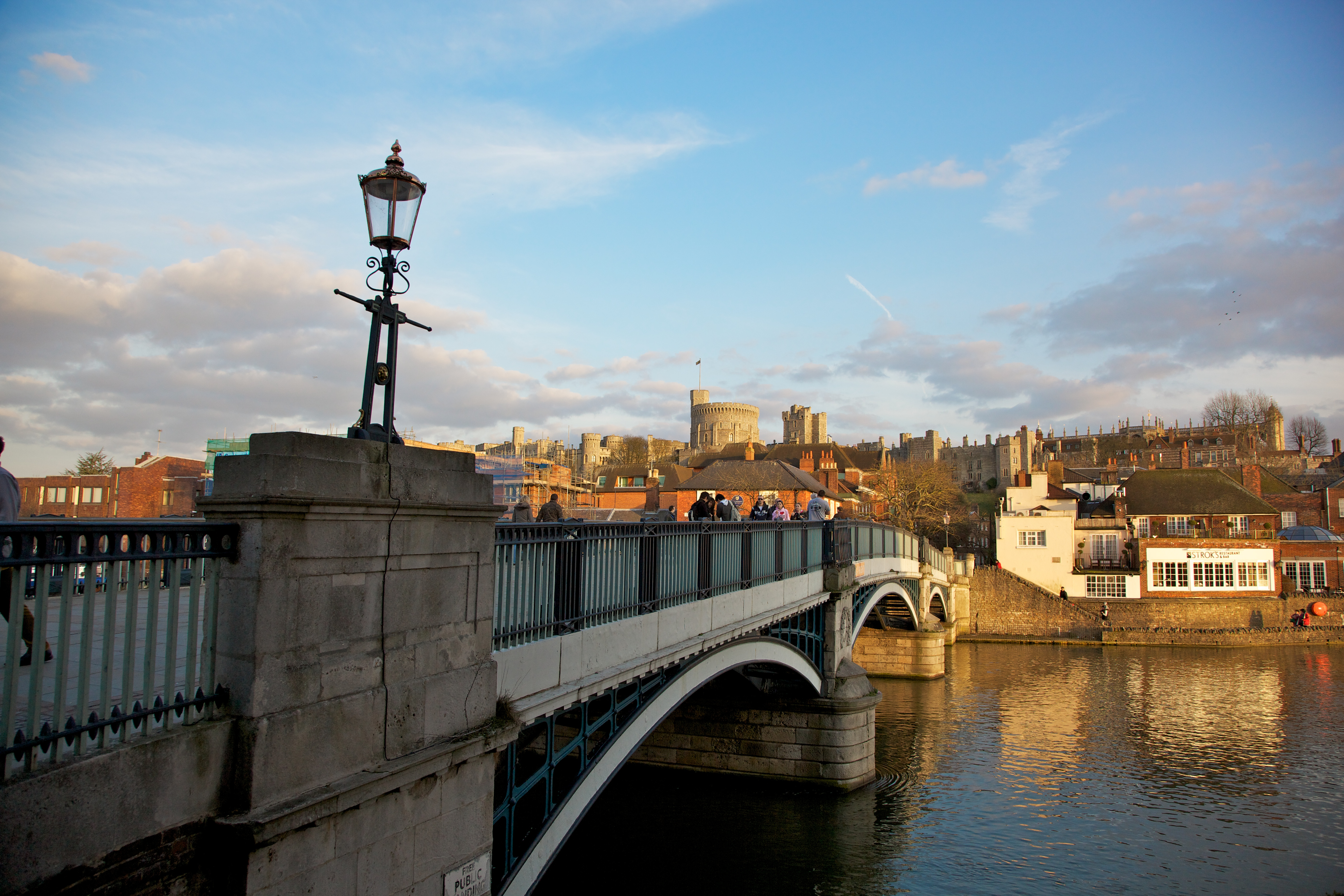 Windsor